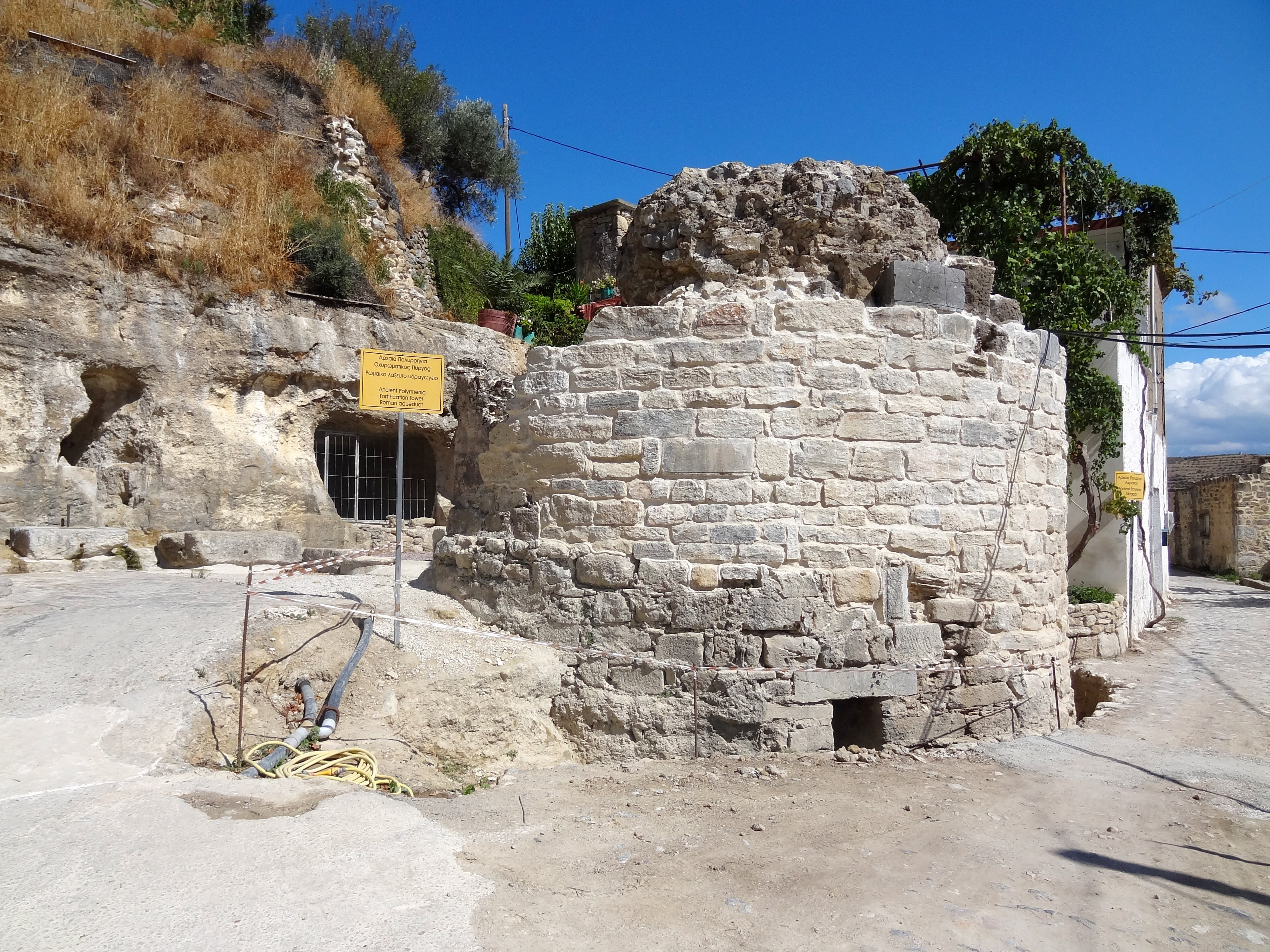 Wehrturm des antiken Polyrrhenia (Πολυρρηνία), Gemeinde Kissamos, Regionalbezirk Chania, Kreta, Griechenland